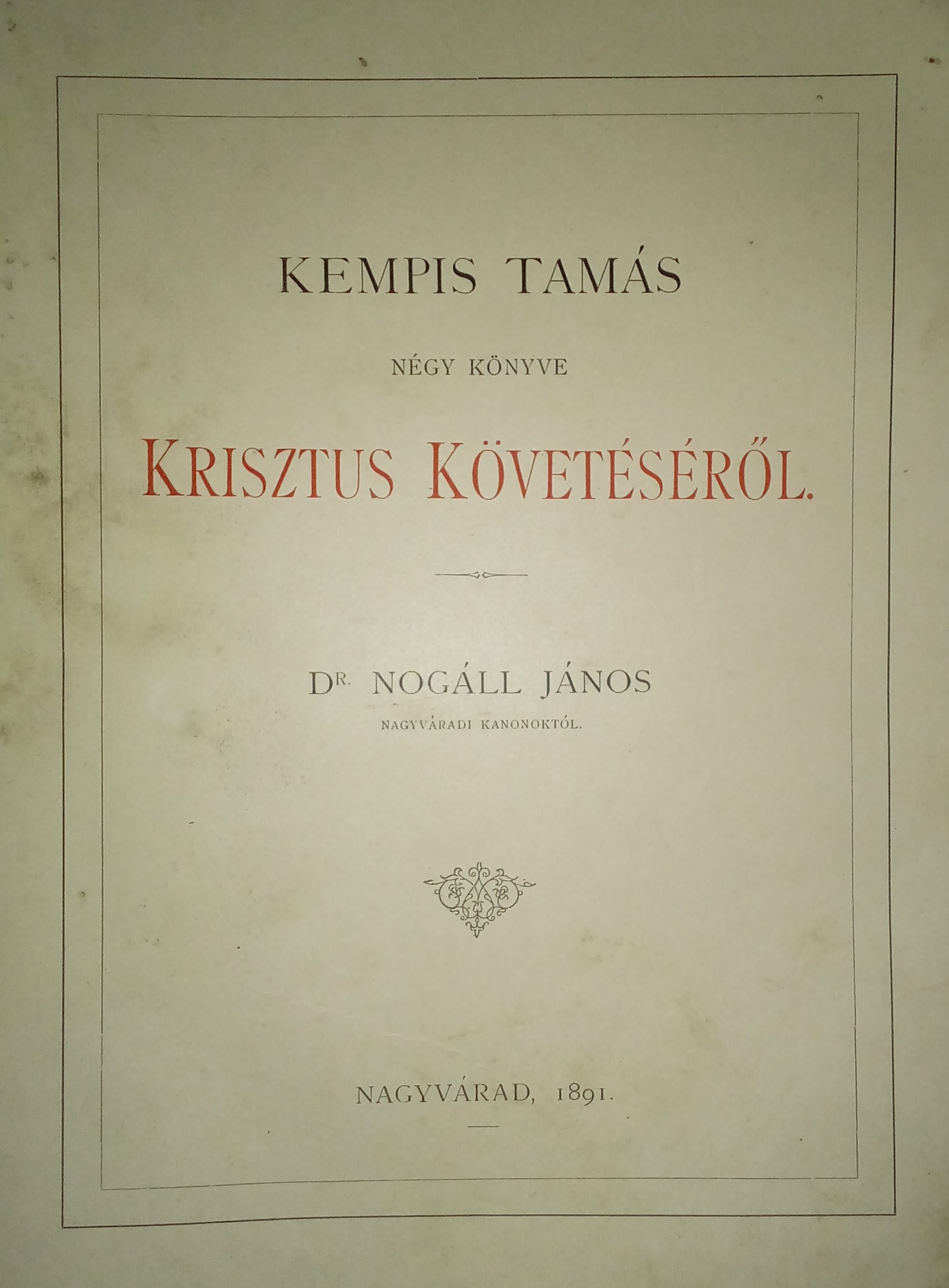 Az adott mű címlapja.